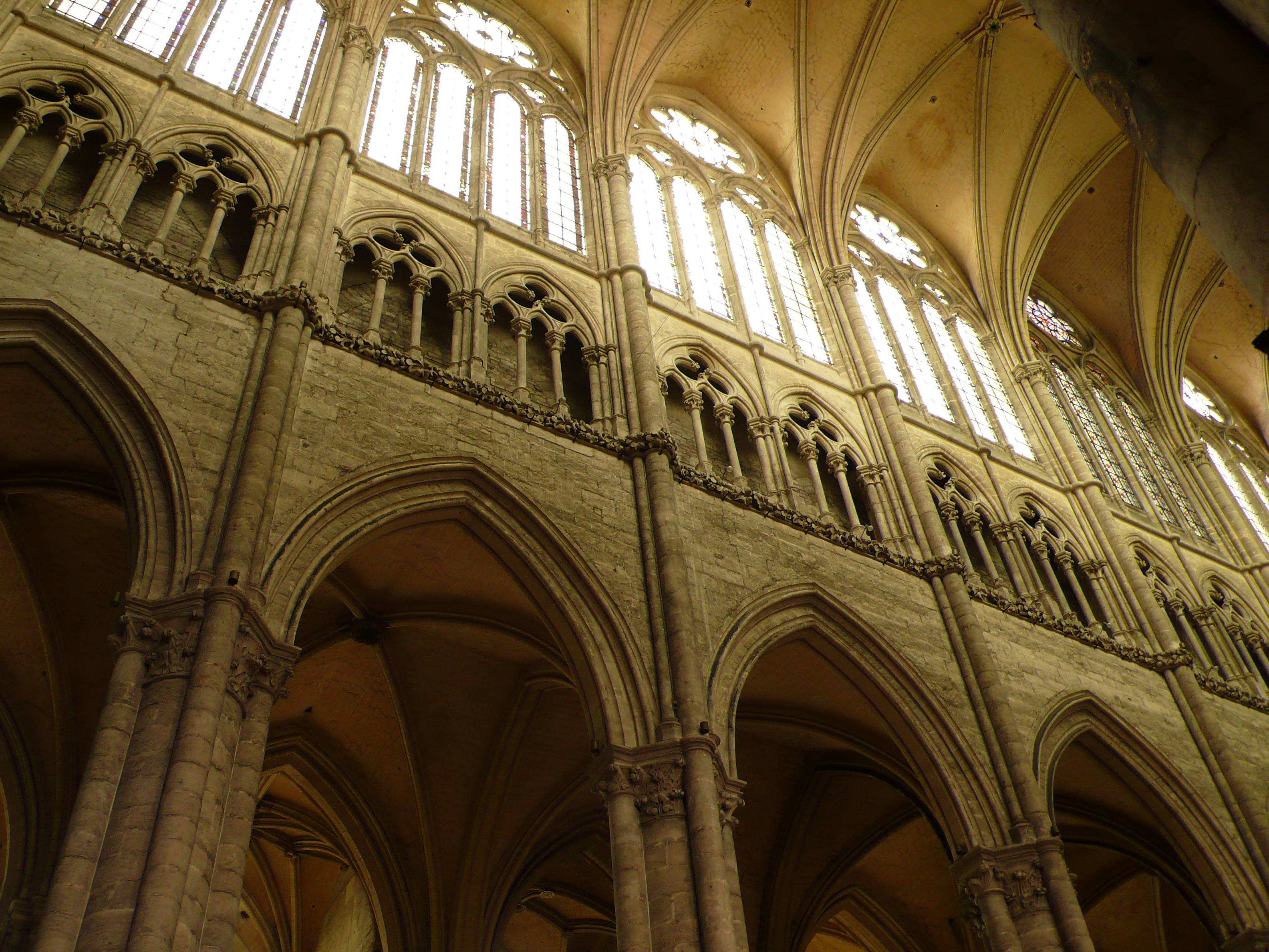 Kathedrale von Amiens, Frankreich; Wandaufriss des Mittelschiffes (Langhaus)